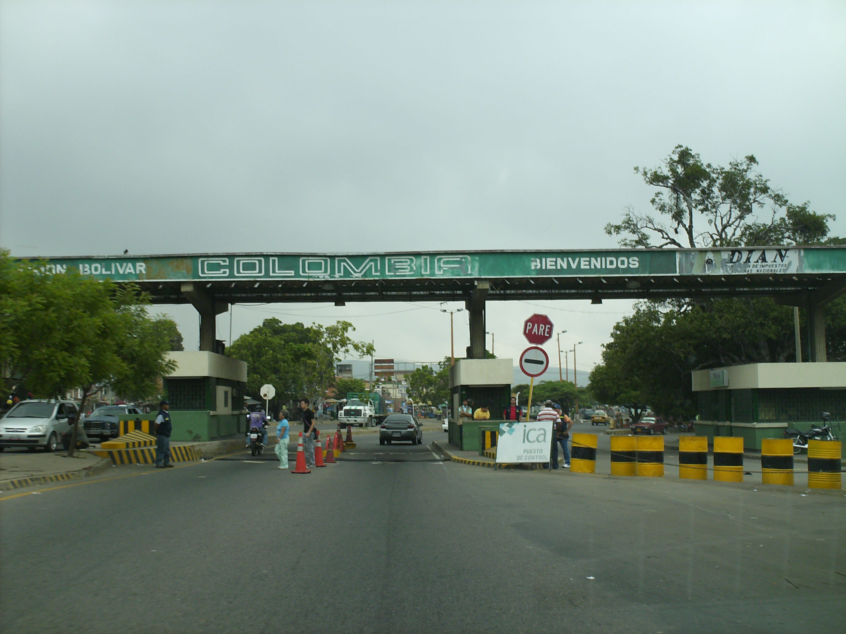 Aduana Colombiana en la frontera entre Colombia y Venezuela.